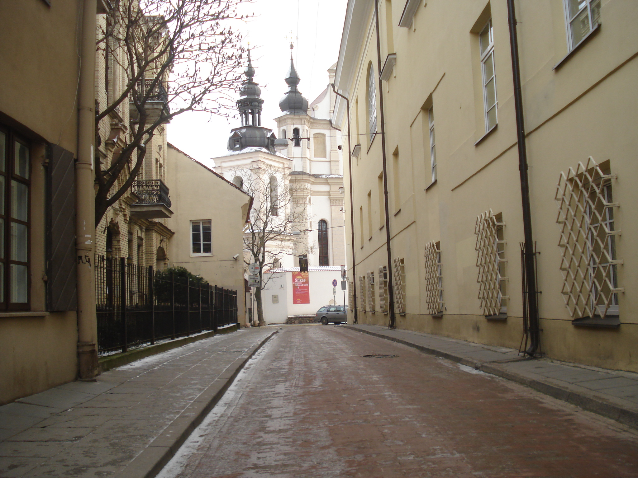 Улица Швянто Миколо и костёл Святого Михаила (Вильнюс).